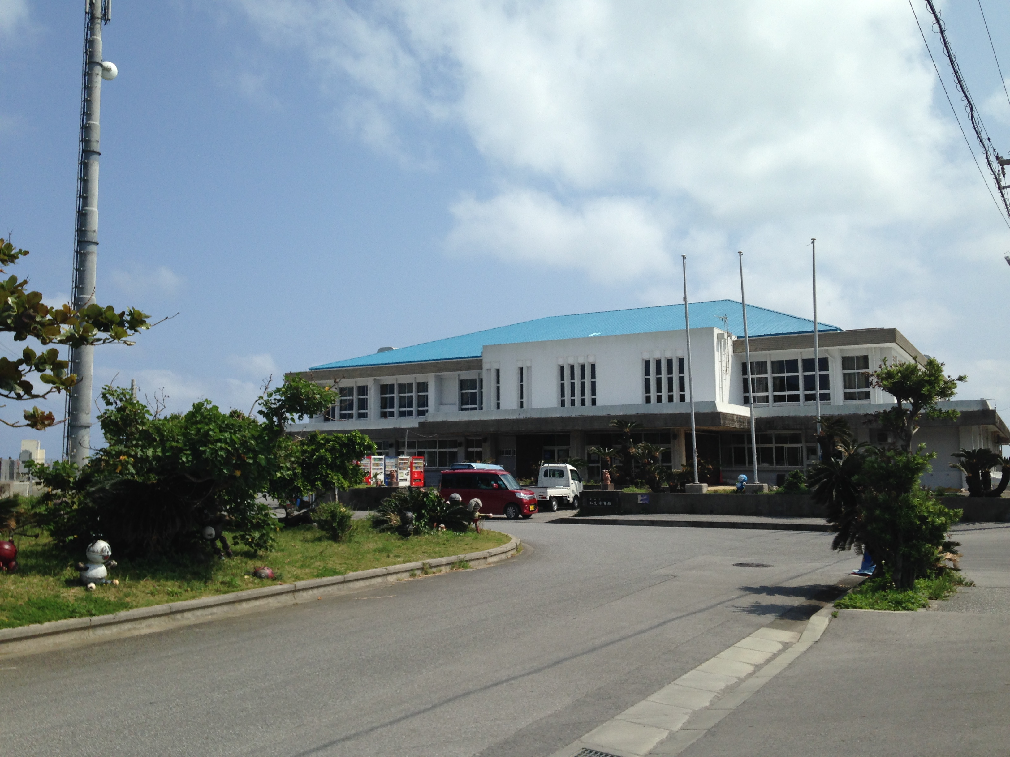 南城市知念体育館